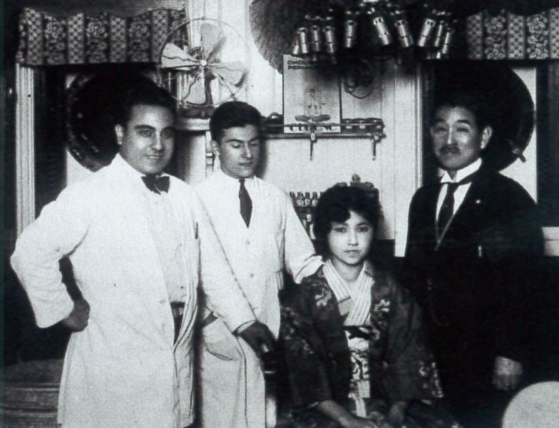 Miyoka Shibayama (Japanese, *1907, †2009, Girlhood)